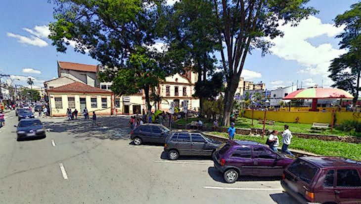 Foto da praça Padre João Álvares, ao fundo, pode-se observar a Igreja Matriz, do município de Itaquaquecetuba, São Paulo.